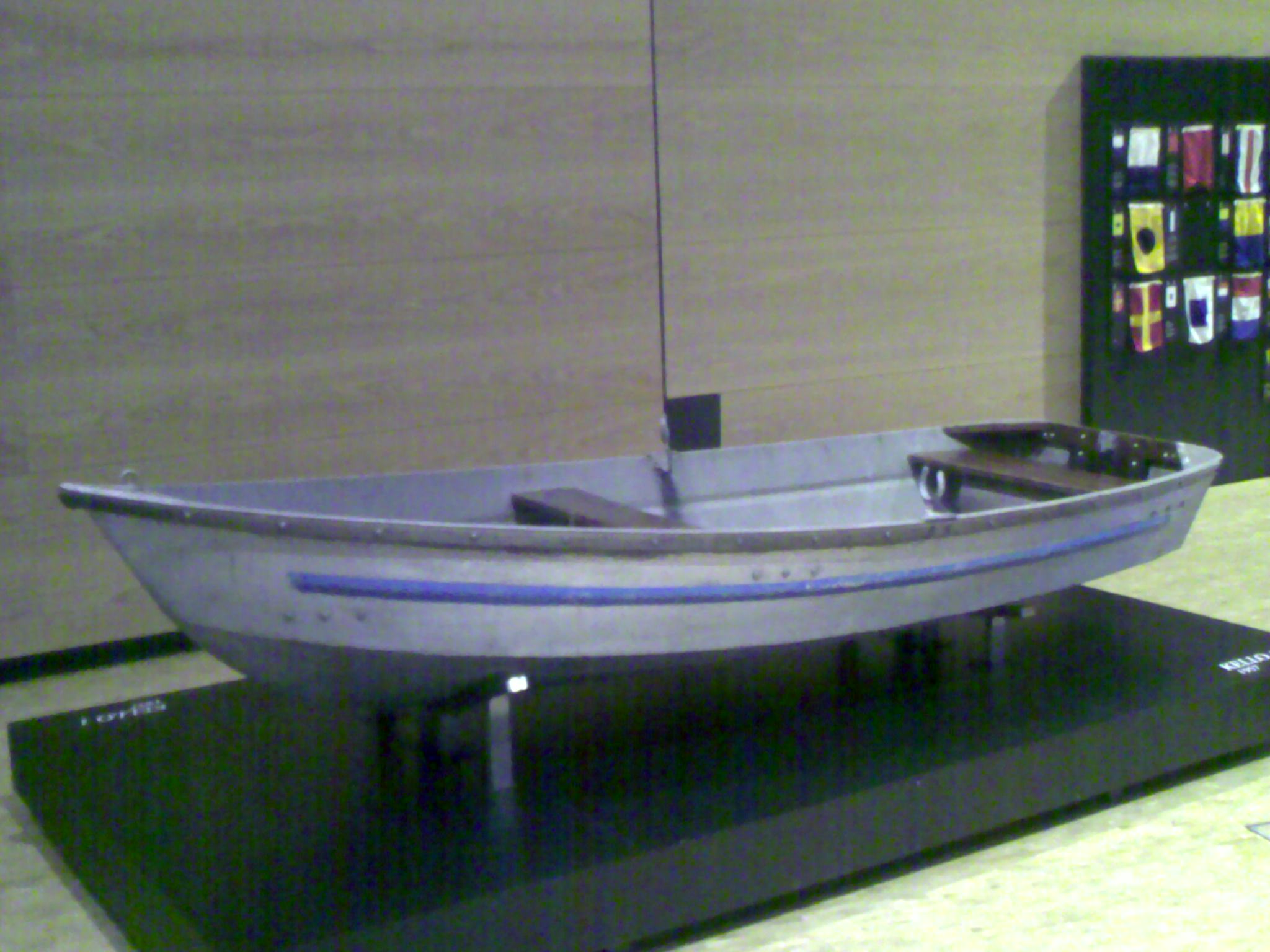 Description